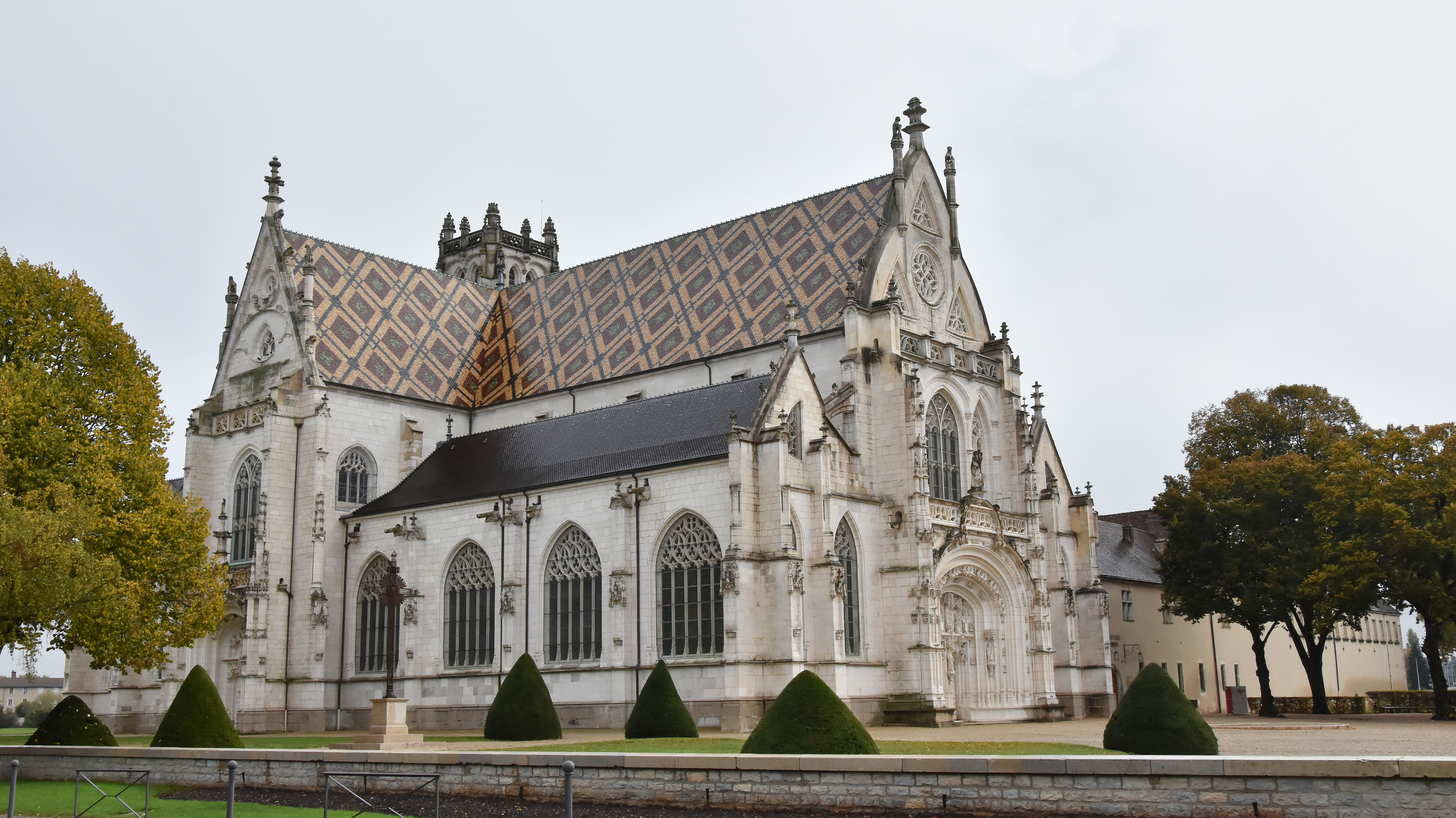 Koninklijk klooster van Brou met de kerk van Nicolaas van Tolentijn, Bourg-en-Bresse